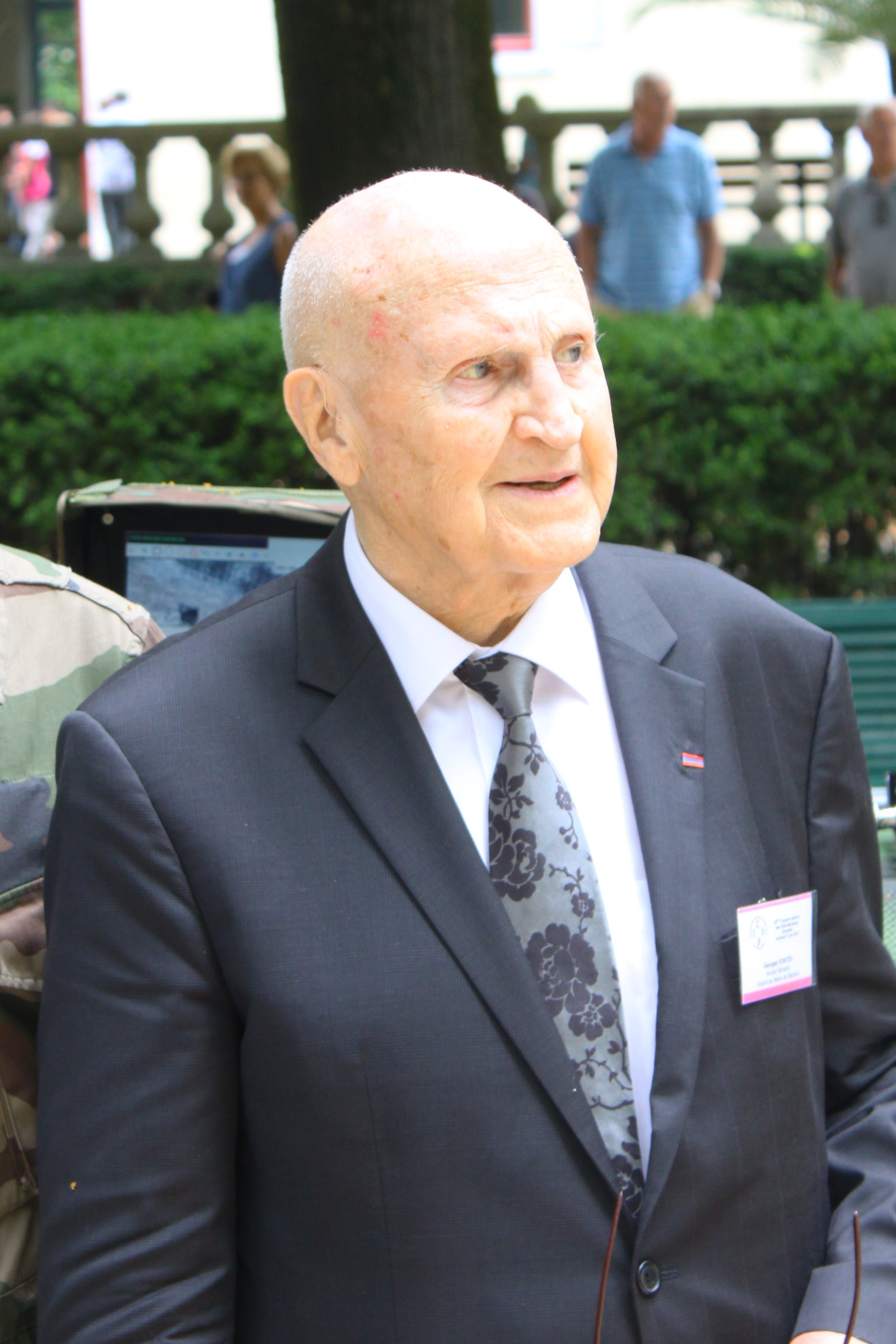 Georges Fontès en juin 2011 à Grenoble.